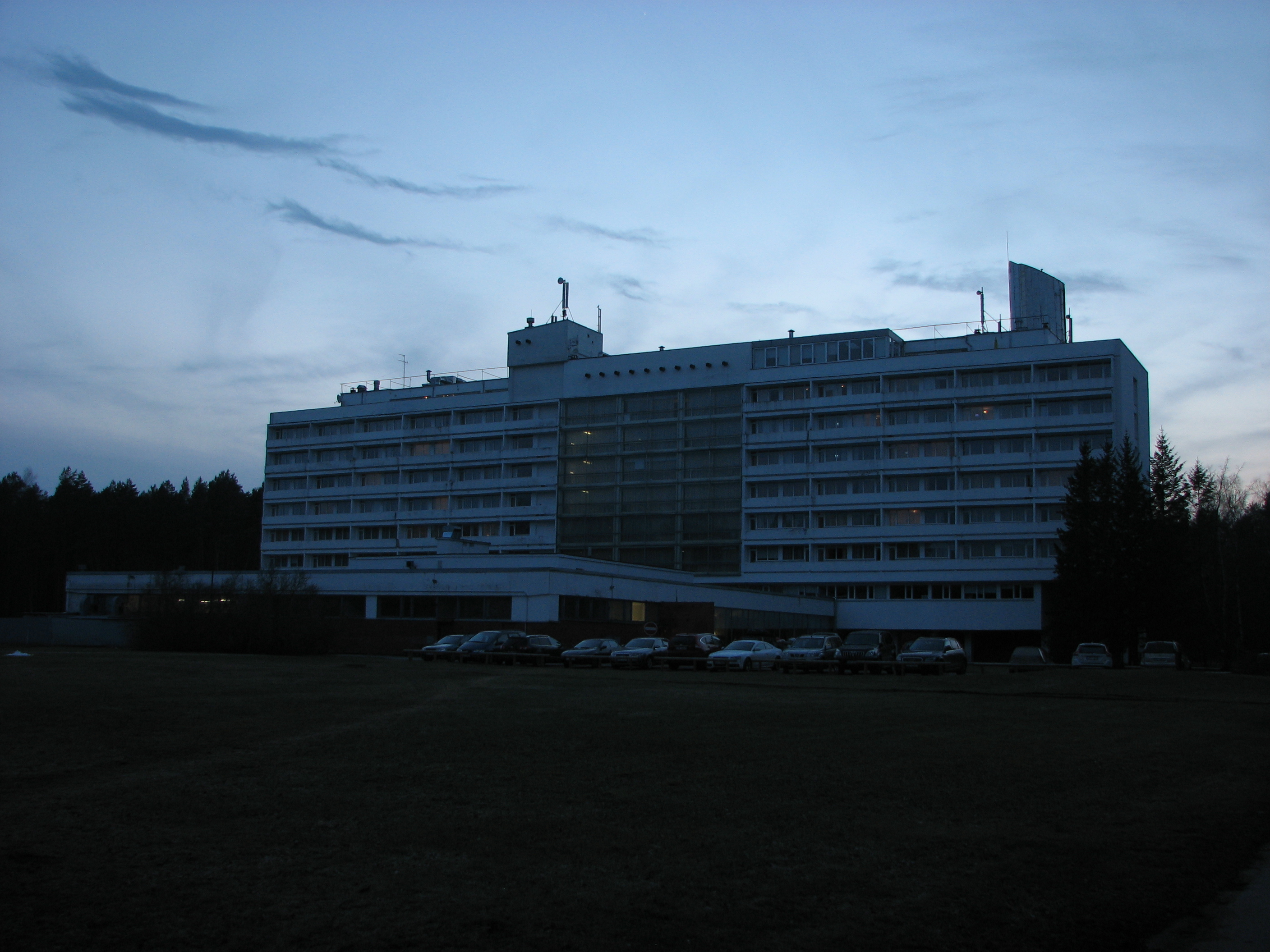 Юрмала. Санаторий "Яункемери".